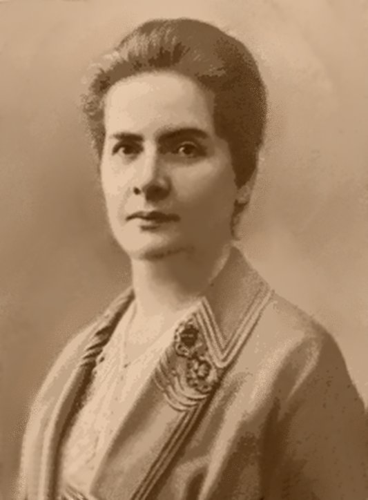 Drª Praguer Fróes, médica e feminista brasileira.